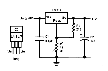 LM117/317 pingestabilisaatori rakendusskeem